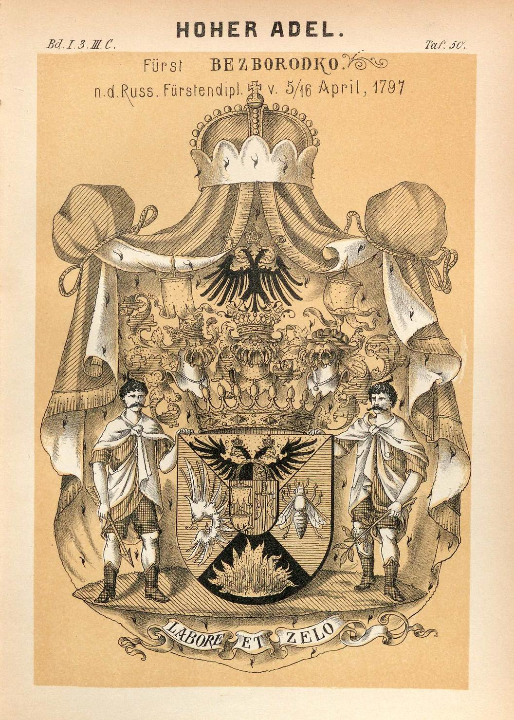 Πηγή - J.Siebmacher's grosses und allgemeines Wappenbuch.1. Band, 3. Abteilung, 3. Teil: 1894. Hoher Adel C (die europäischen Fürstengeschlechter nicht römisch-kaiserlicher oder deutsch-bundesfürstlicher Extraction), 1. Teil, Taf.50